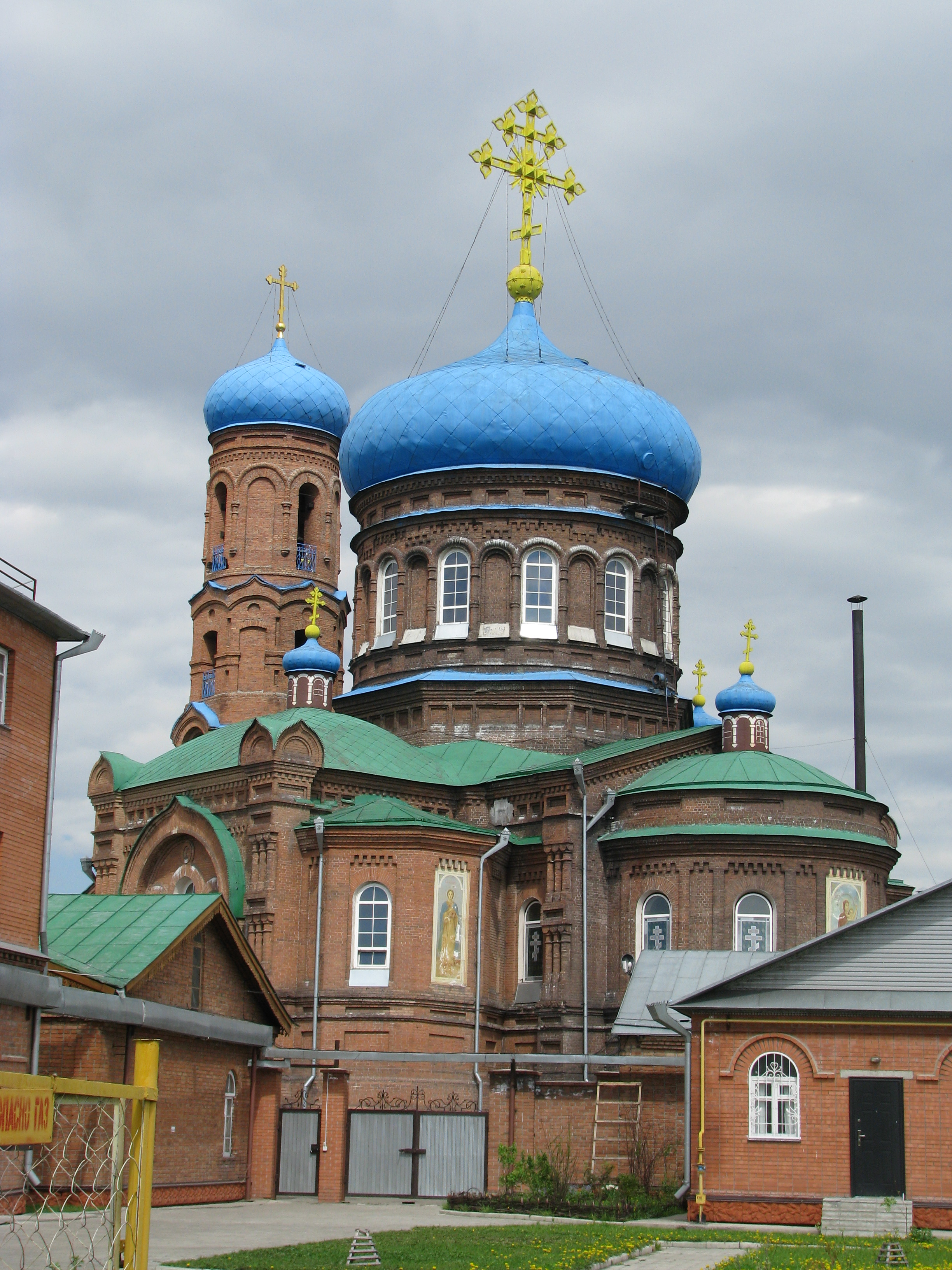 Покровский кафедральный собор (Барнаул)